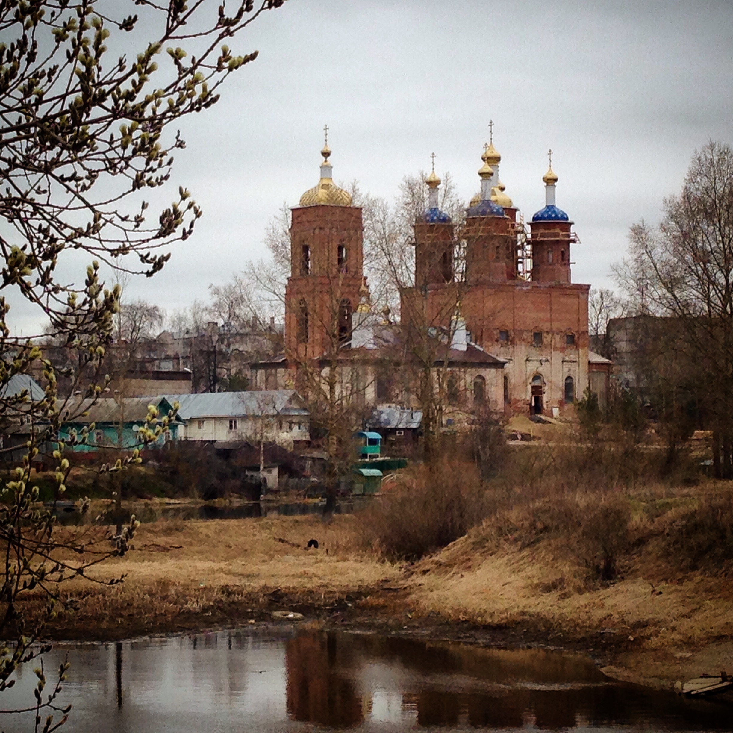 п. Шексна, Вологодская область